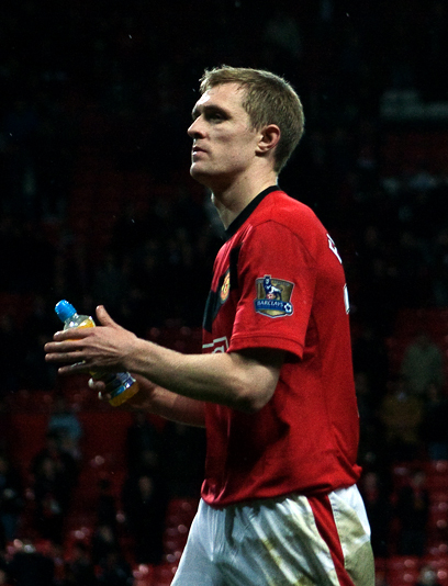 Darren Fletcher vs Everton, at Old Trafford, Manchester, November 2009.